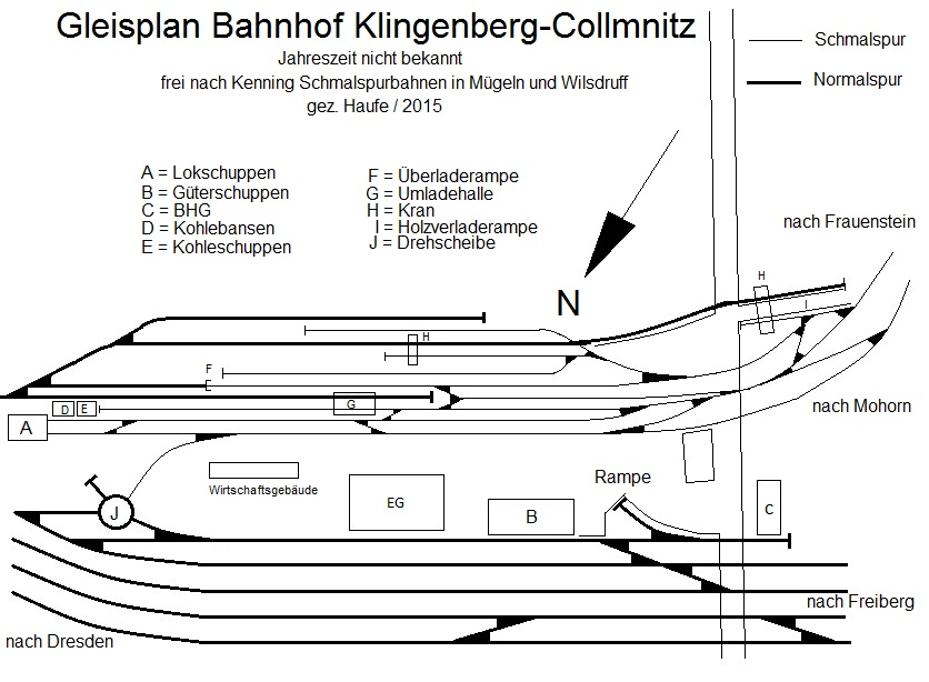 Gleisplan des Bahnhofs Klingenberg-Collmnitz zu Zeiten der Schmalspurbahn, genaue Jahreszeit ist nicht bekannt